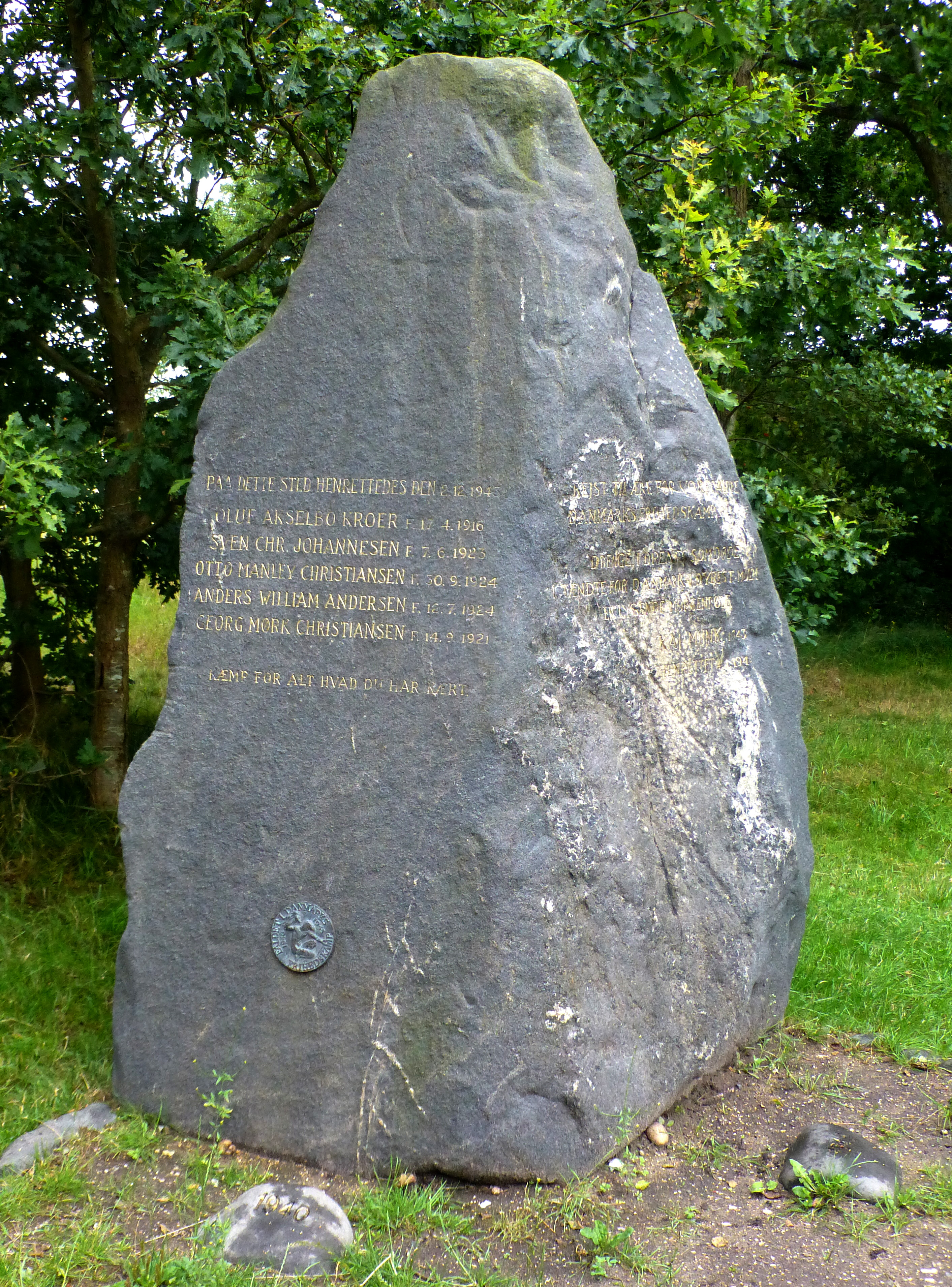 Mindesten for henrettelserne 2. december 1943, af 5 danske jernbanesabotører på Skæring Hede